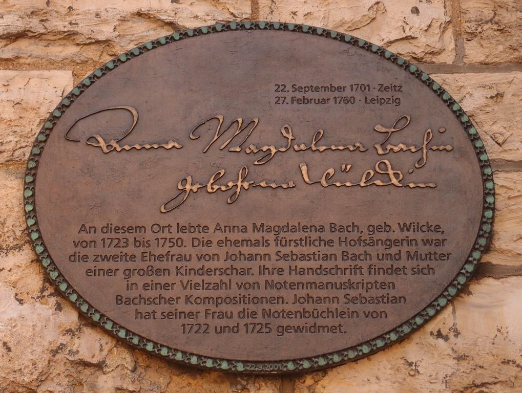 Plakette für Anna Magdalena Bach (1701-1760), Sängerin und zweite Ehefrau Johann Sebastian Bachs, im Thomaskirchhof in Leipzig